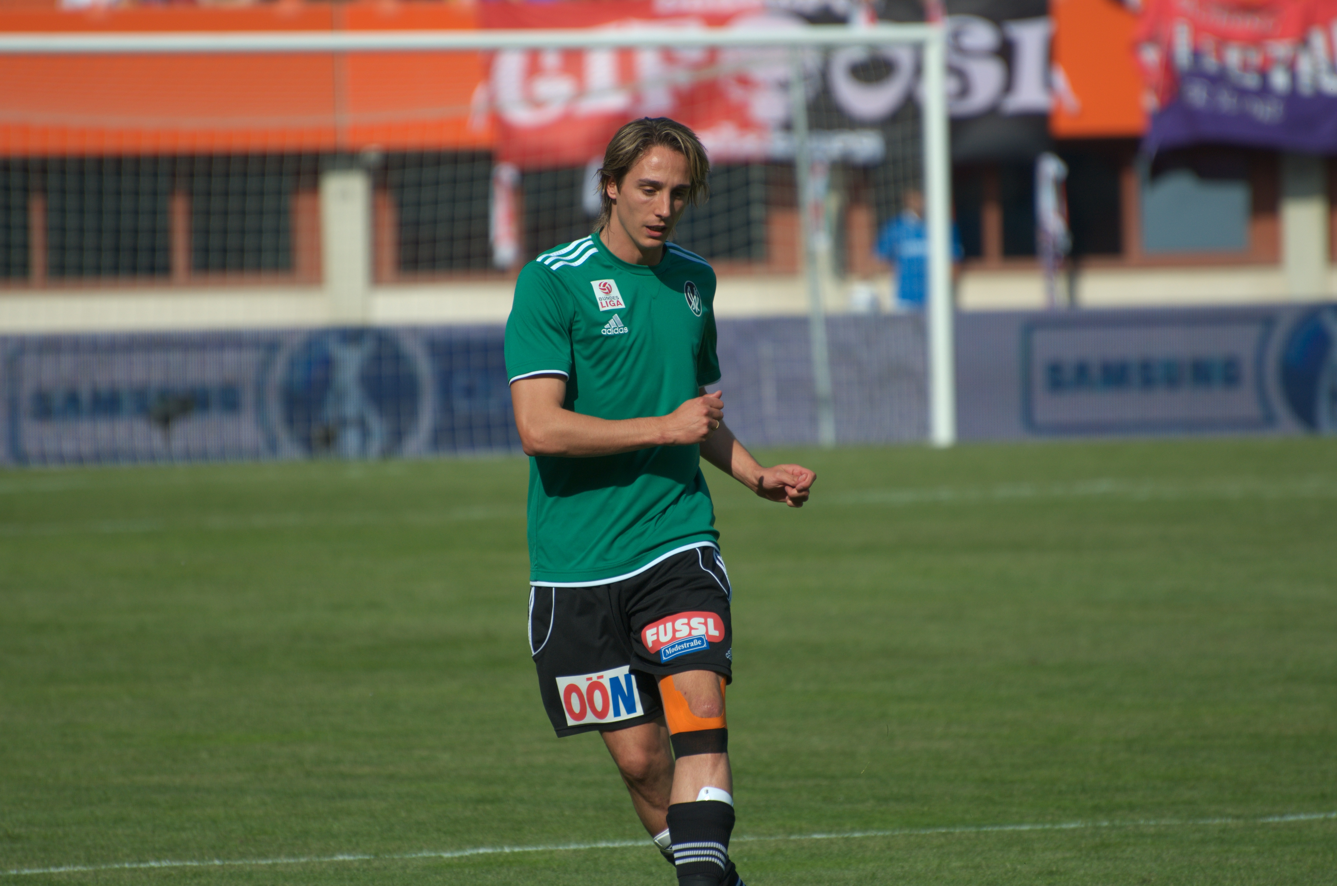 Iván Carril in der Halbzeitpause beim ÖFB-Cupfinale 2012